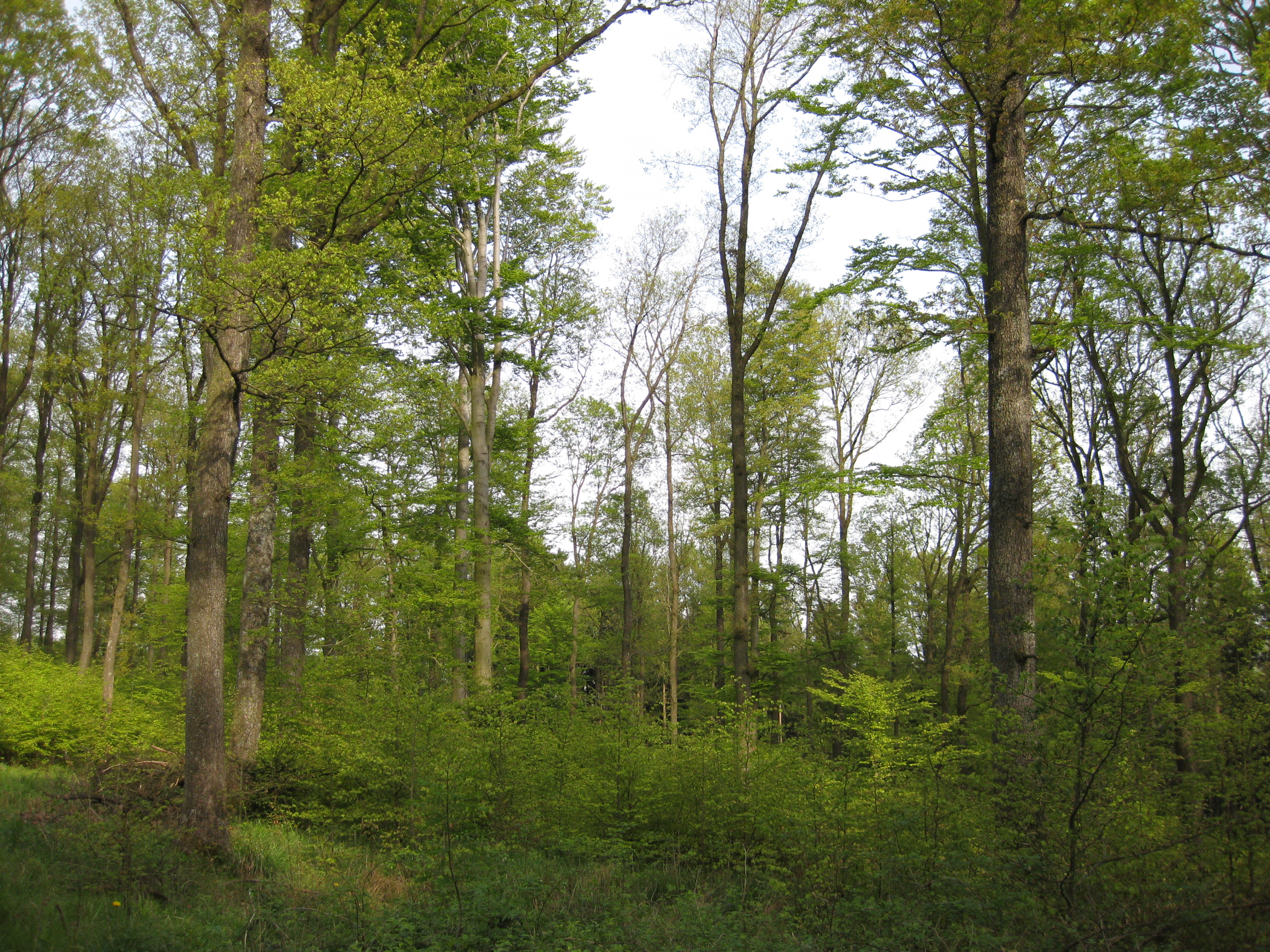 Naturschutzgebiet Brummerhagen (südliche Teilfläche), Brilon-Scharfenberg, Nordrhein-Westfalen, Deutschland.